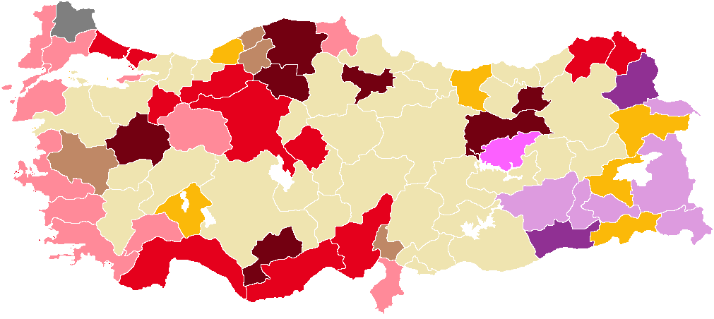 Die jeweiligen Parteien, die ihren Amt halten konnten, und neu errungen konnten.